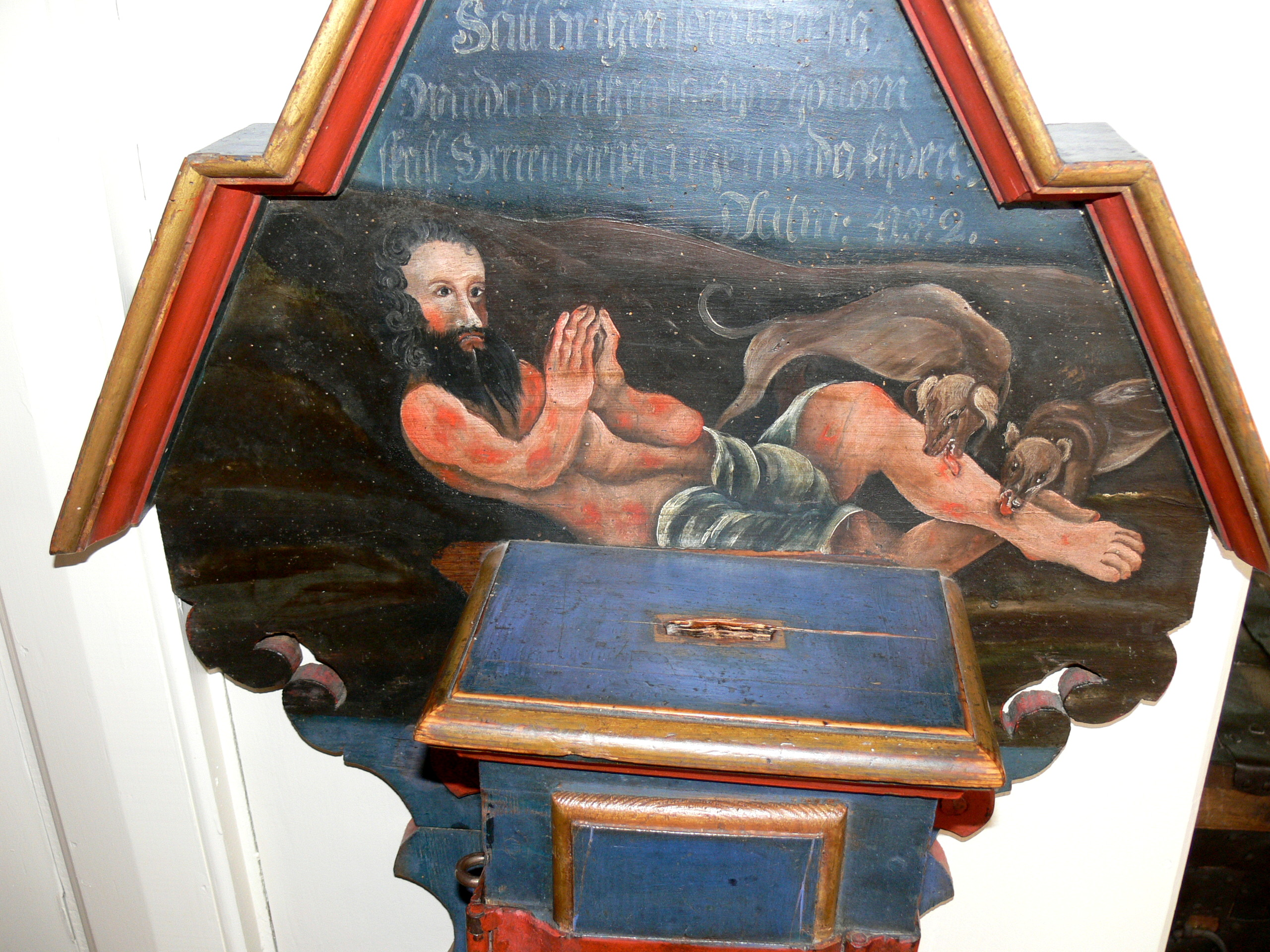 Farö kyrka auf Farö. Almosenkasten.